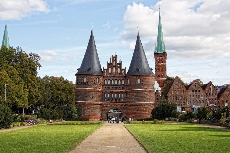 Hansestadt Lübeck, Schleswig-Holstein, Deutschland